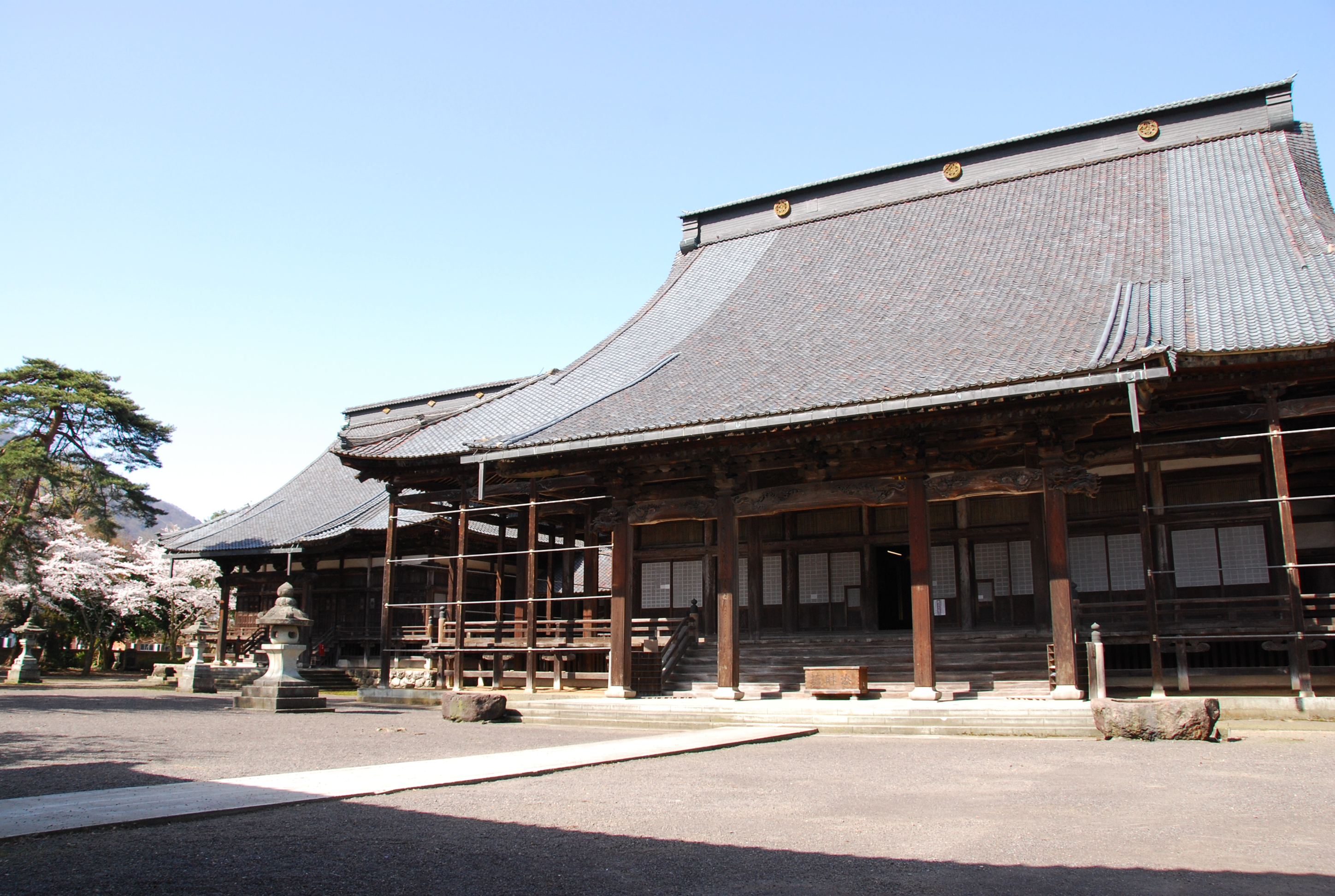 御影堂と阿弥陀堂